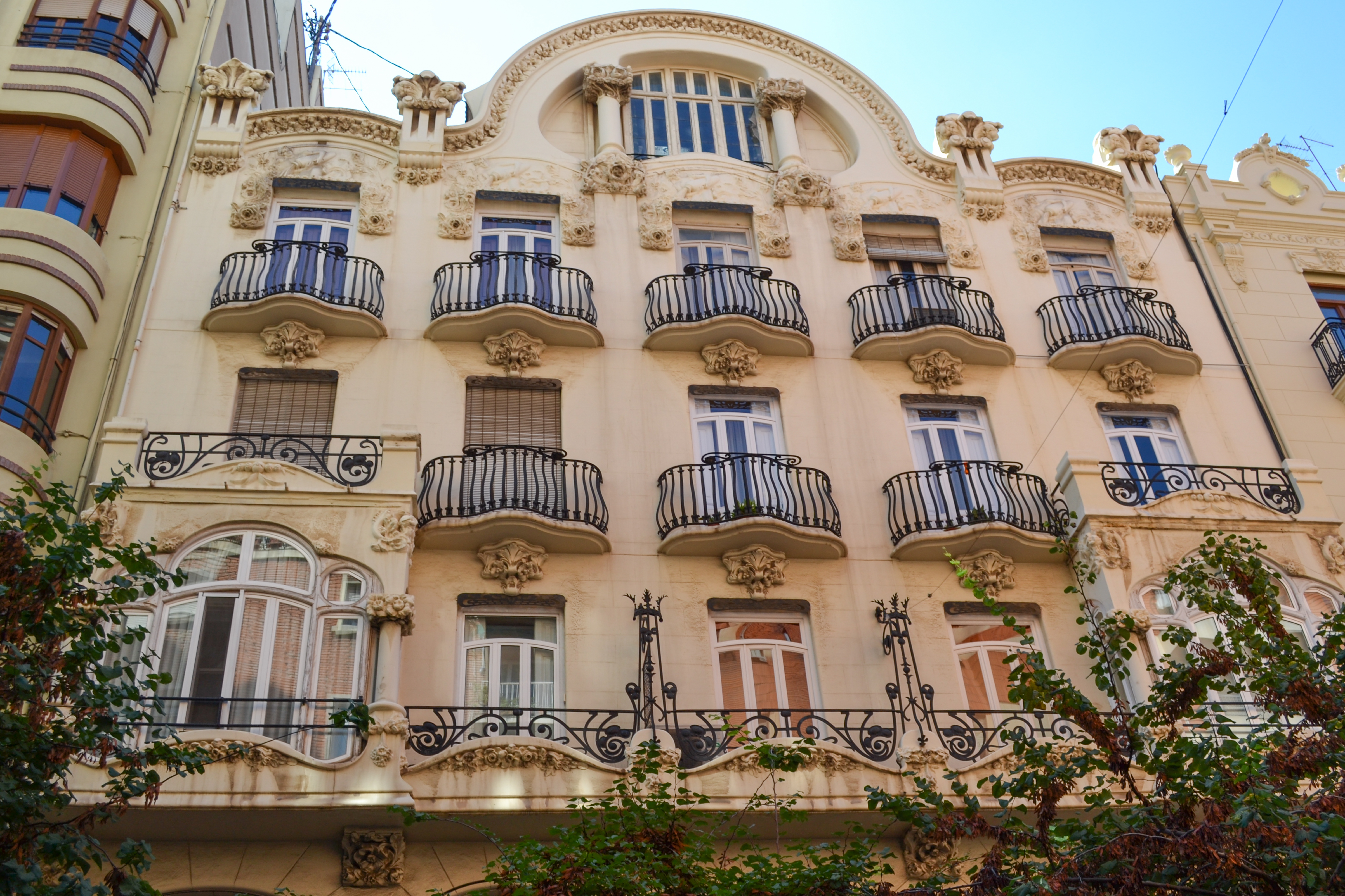 Casa Peris, València.